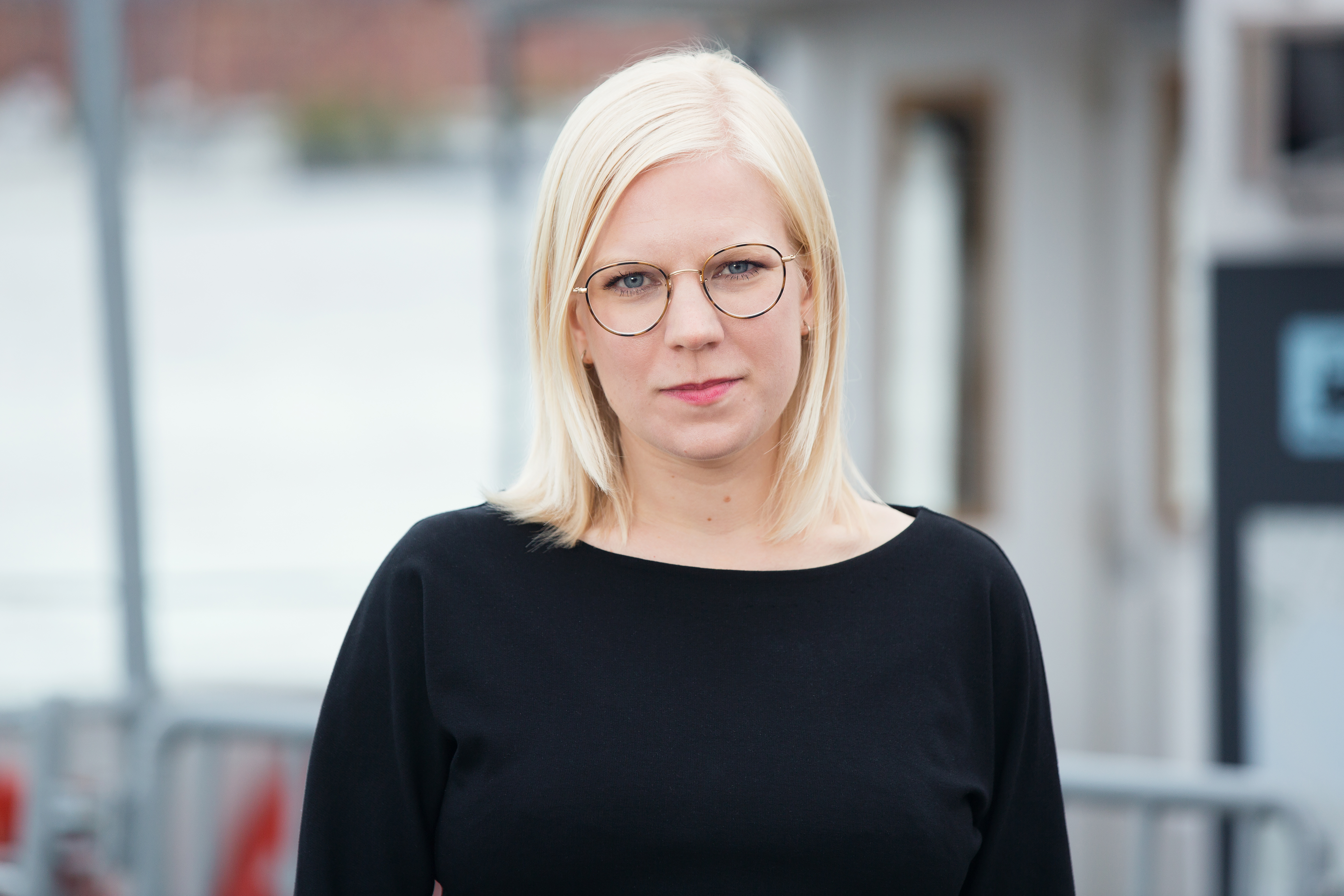 Gruppledare för Centerpartiet i Stockholms stad